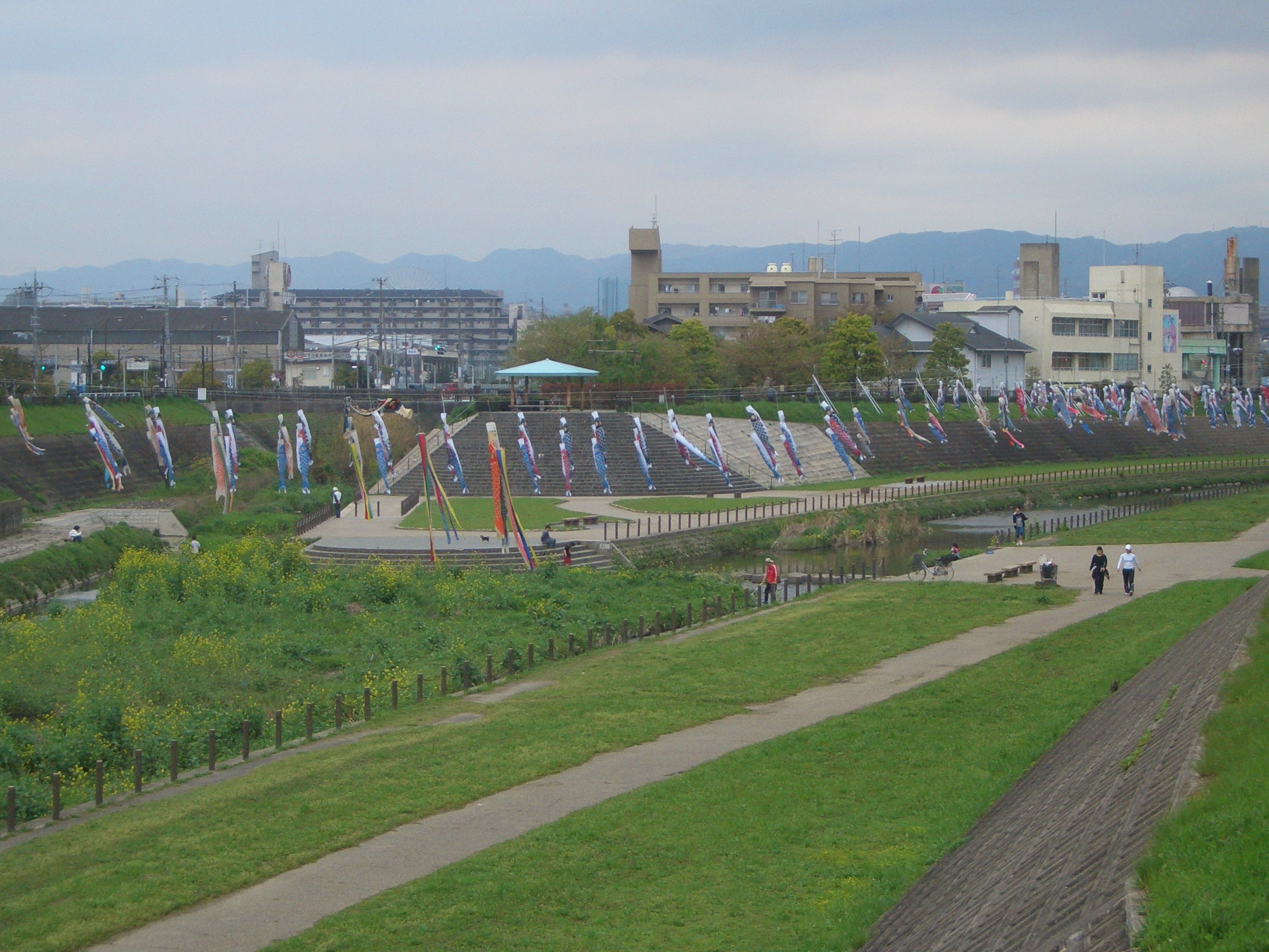 大正川。Taisyou River。